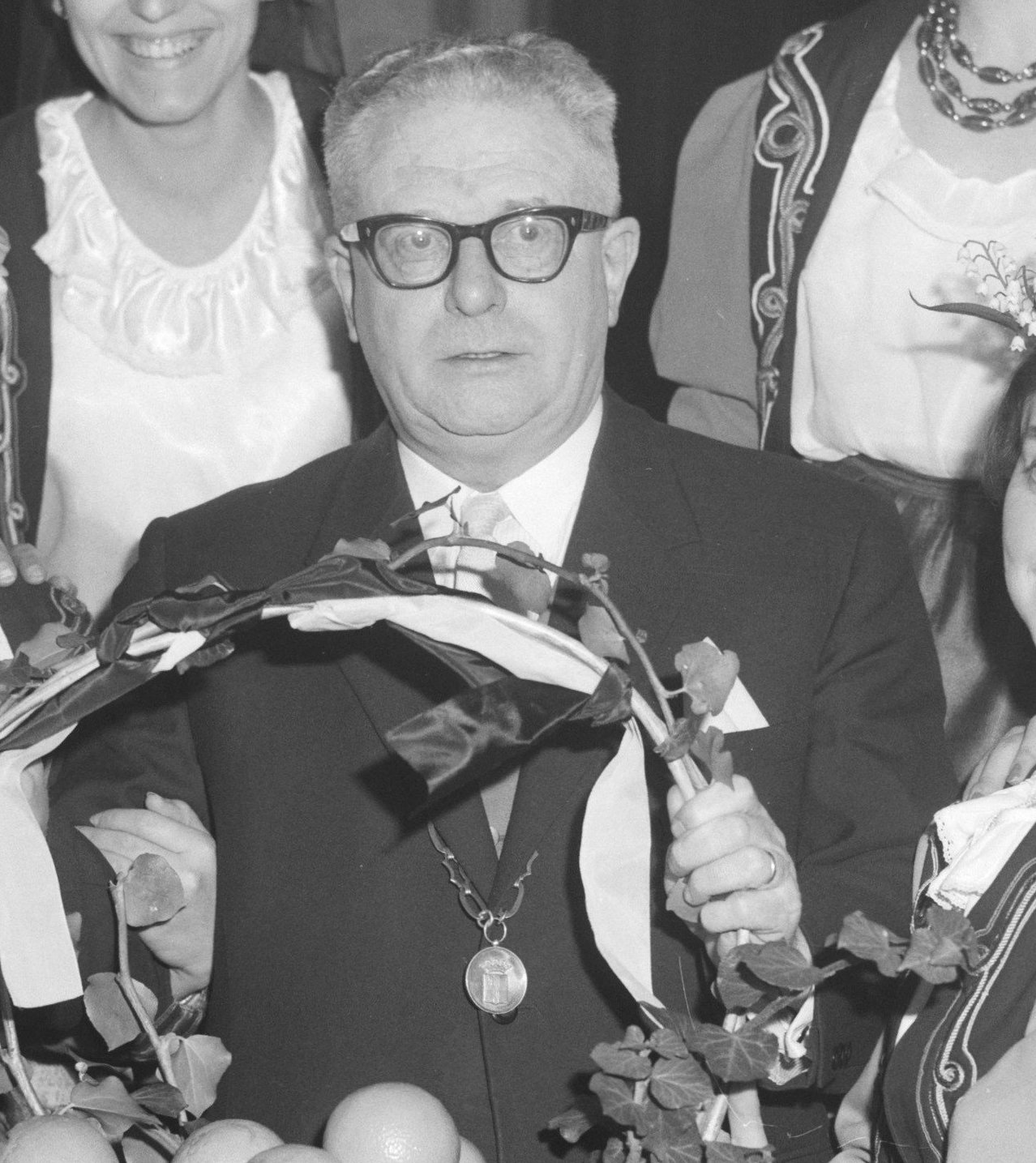 Collectie / Archief : Fotocollectie Anefo Reportage / Serie : [ onbekend ] Beschrijving : Geschenk van Spanje aan ziekenhuizen in Twente, Burgemeester J. de Vries met Spaanse werknemers Datum : 5 januari 1963 Locatie : Overijssel, Twente Trefwoorden : WERKNEMERS, ZIEKENHUIZEN, geschenken Persoonsnaam : Burgemeester J. de Vries Fotograaf : Bilsen, Joop van / Anefo Auteursrechthebbende : Nationaal Archief Materiaalsoort : Negatief (zwart/wit) Nummer archiefinventaris : bekijk toegang 2.24.01.04 Bestanddeelnummer : 914-6801